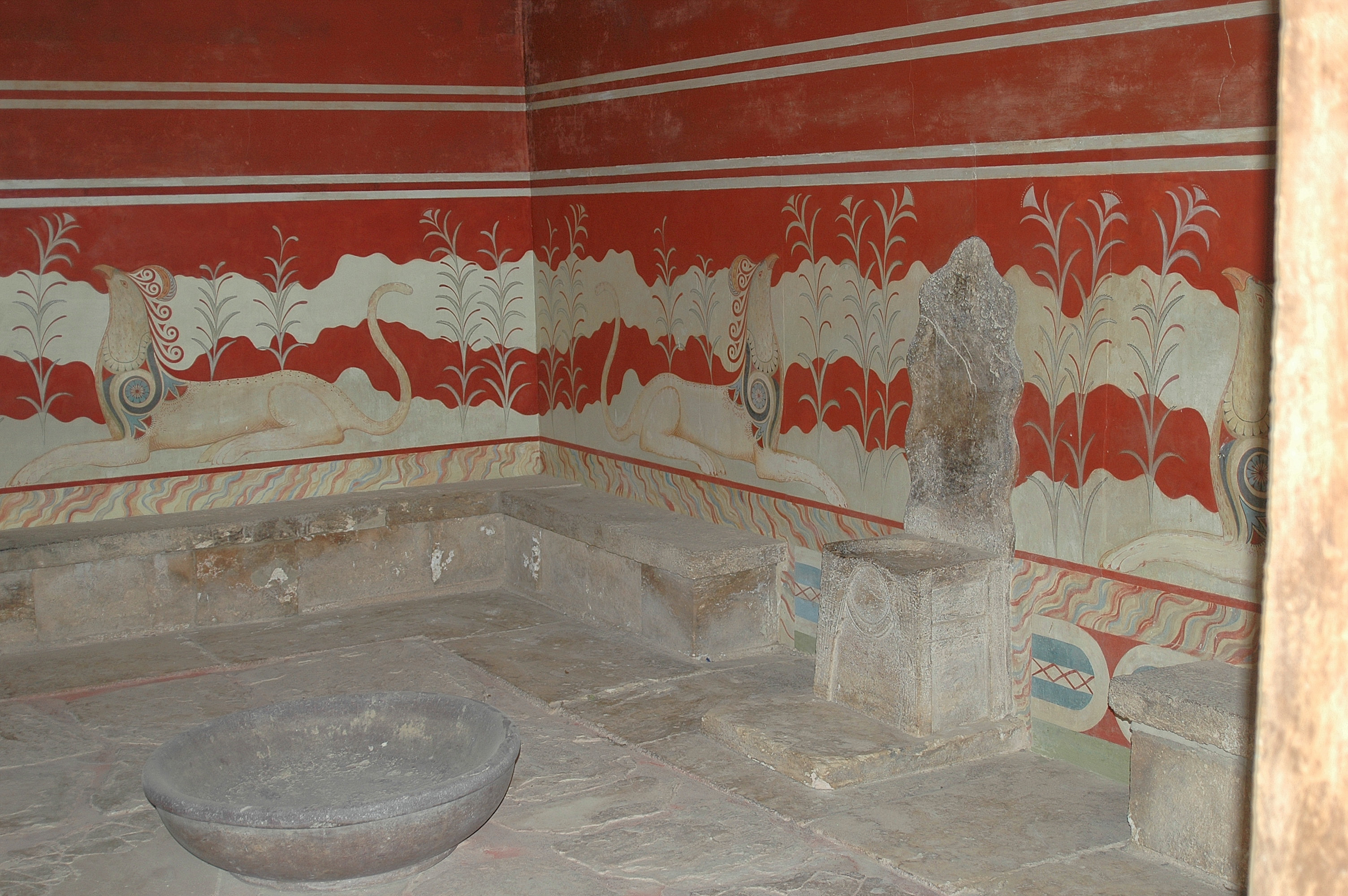 Knossos, trône royal. Photo prise par Harrieta171 le 28/01/06